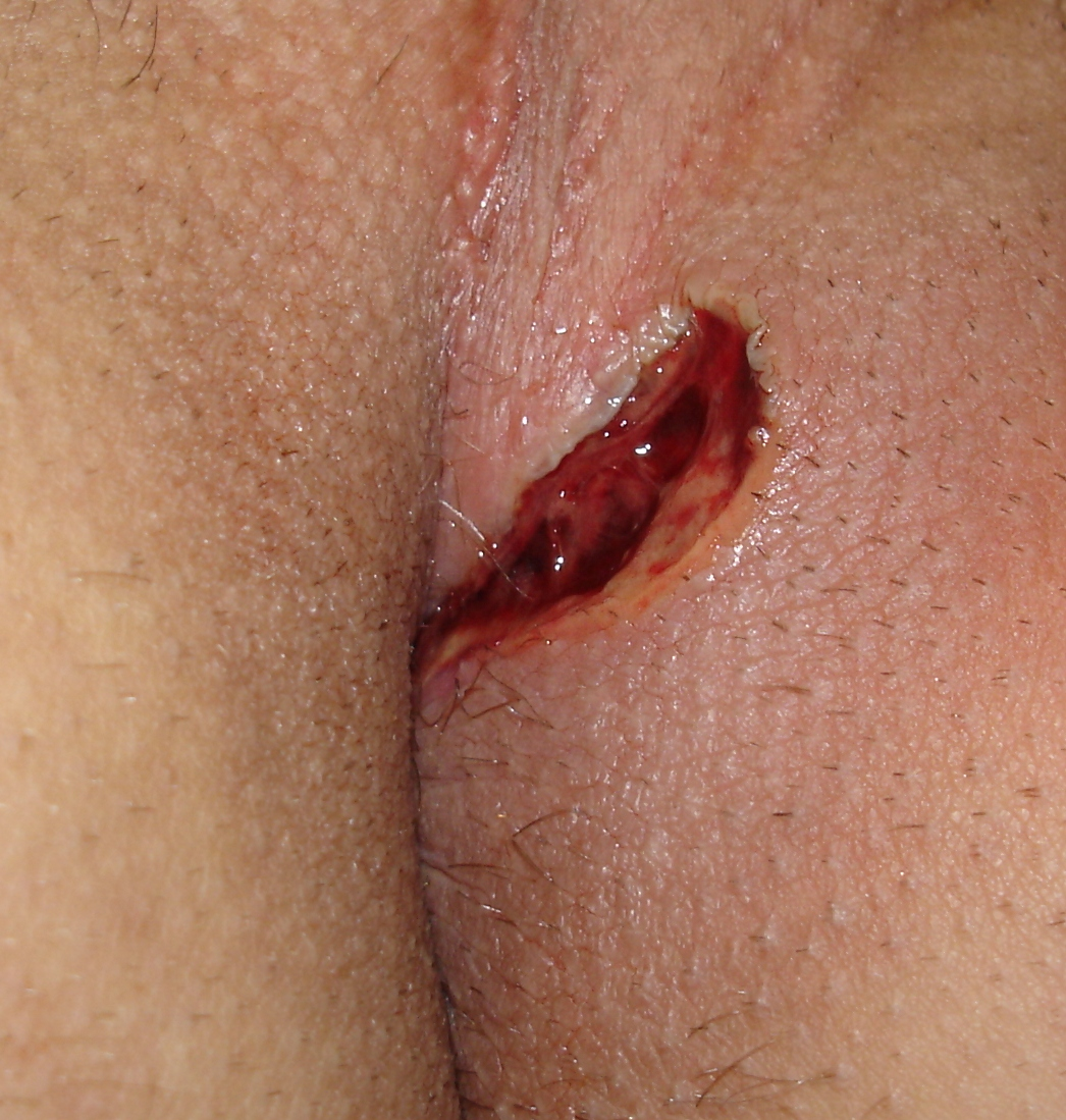 Eine Pilonidalfistel nach operativer asymmetrischer Resektion